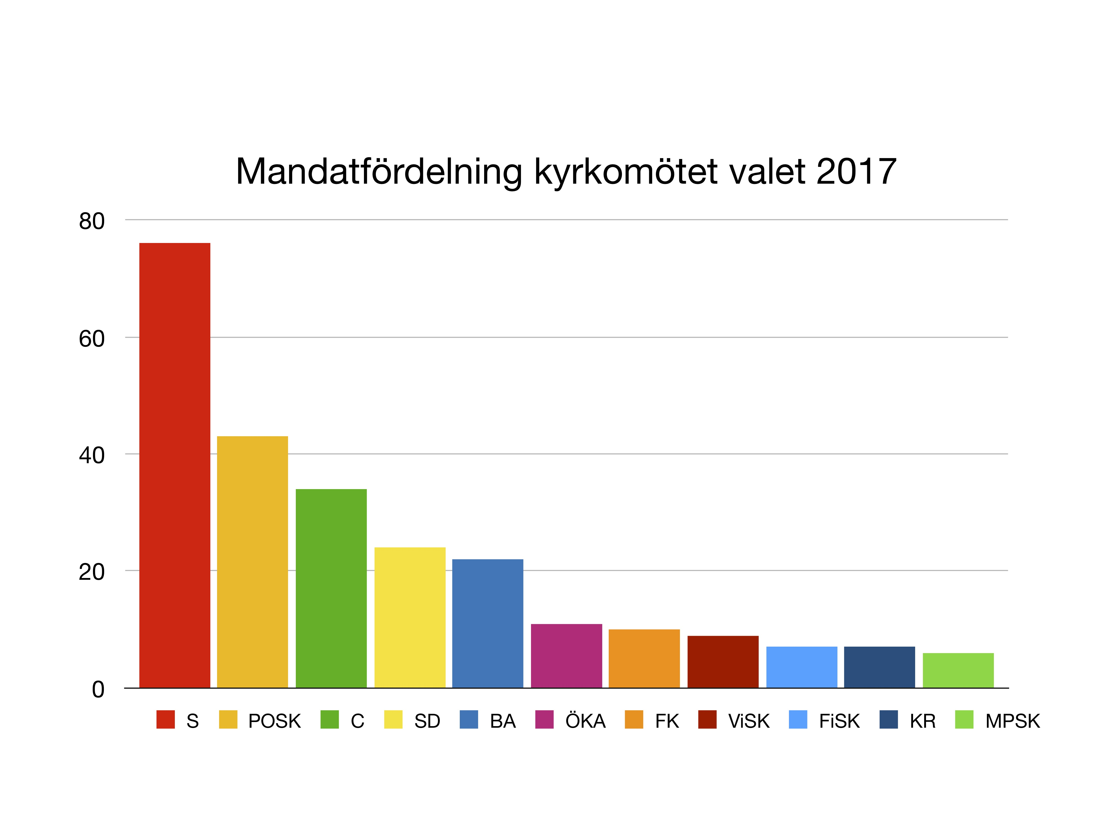 Diagram över mandatfördelning